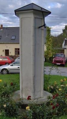 Der Pranger in Ulrichskirchen-Schleinbach (A)